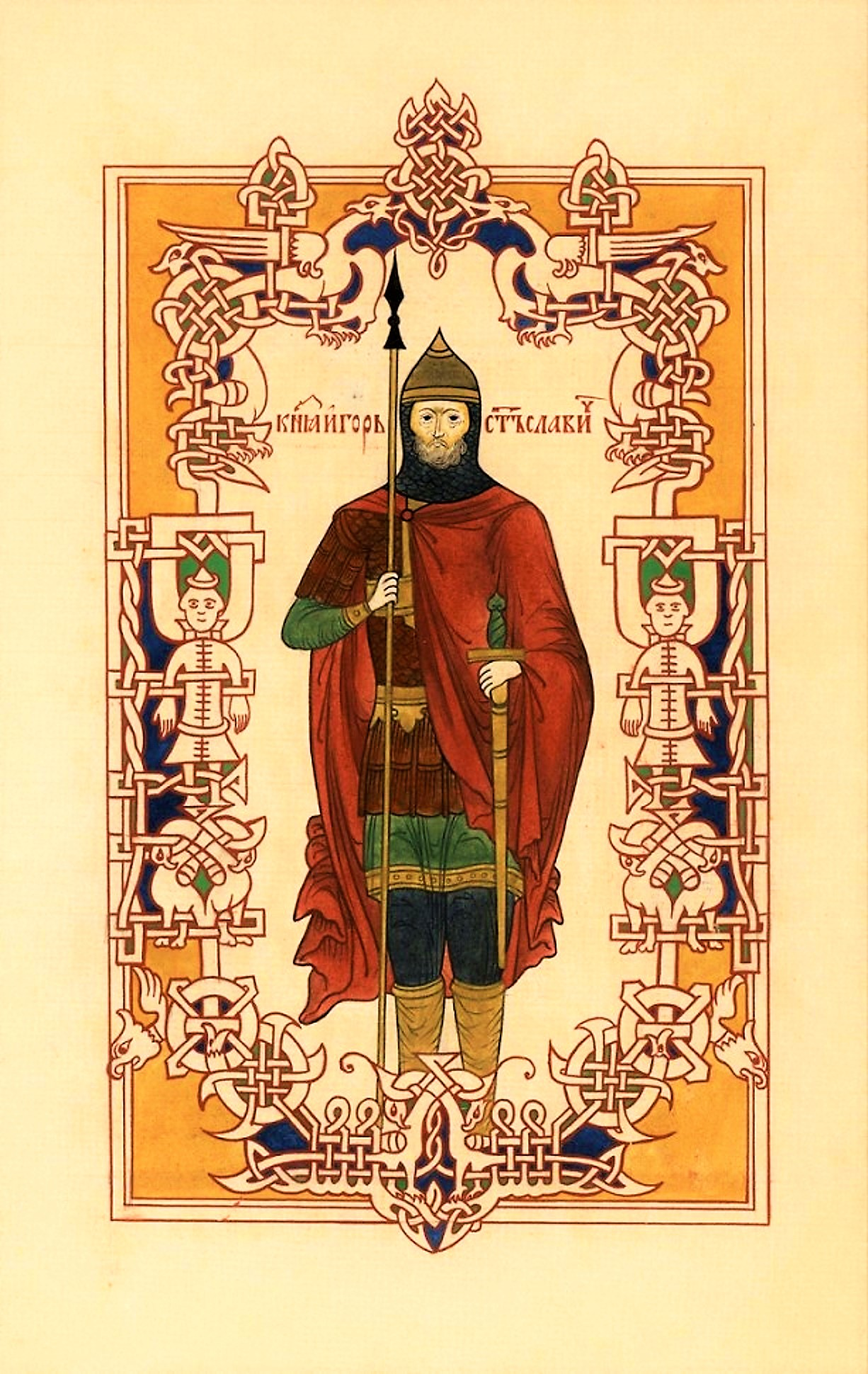 Слово о полку Игореве. Лицевой список. Издание 1912 года